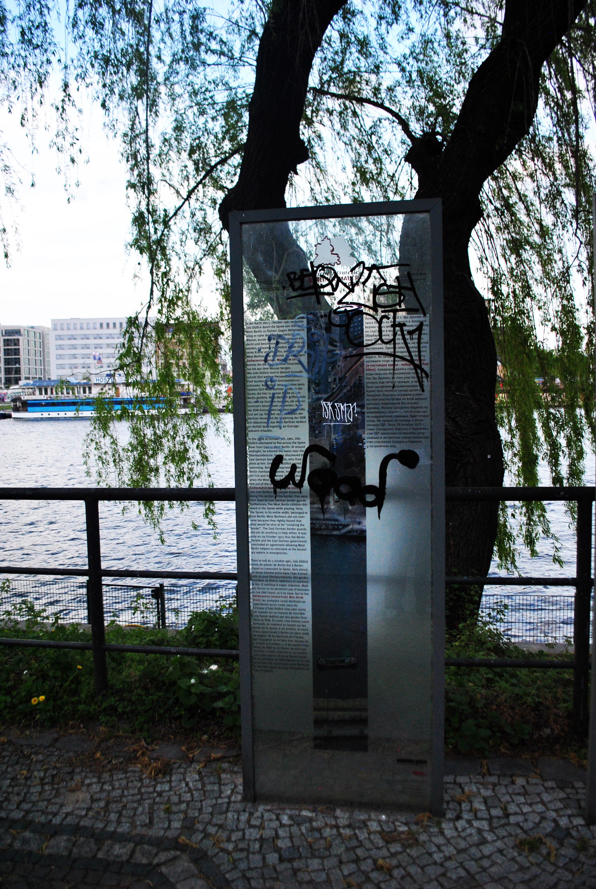 Placa conmemorativa de Udo Düllick en el Río Spree. Berlín, Alemania.